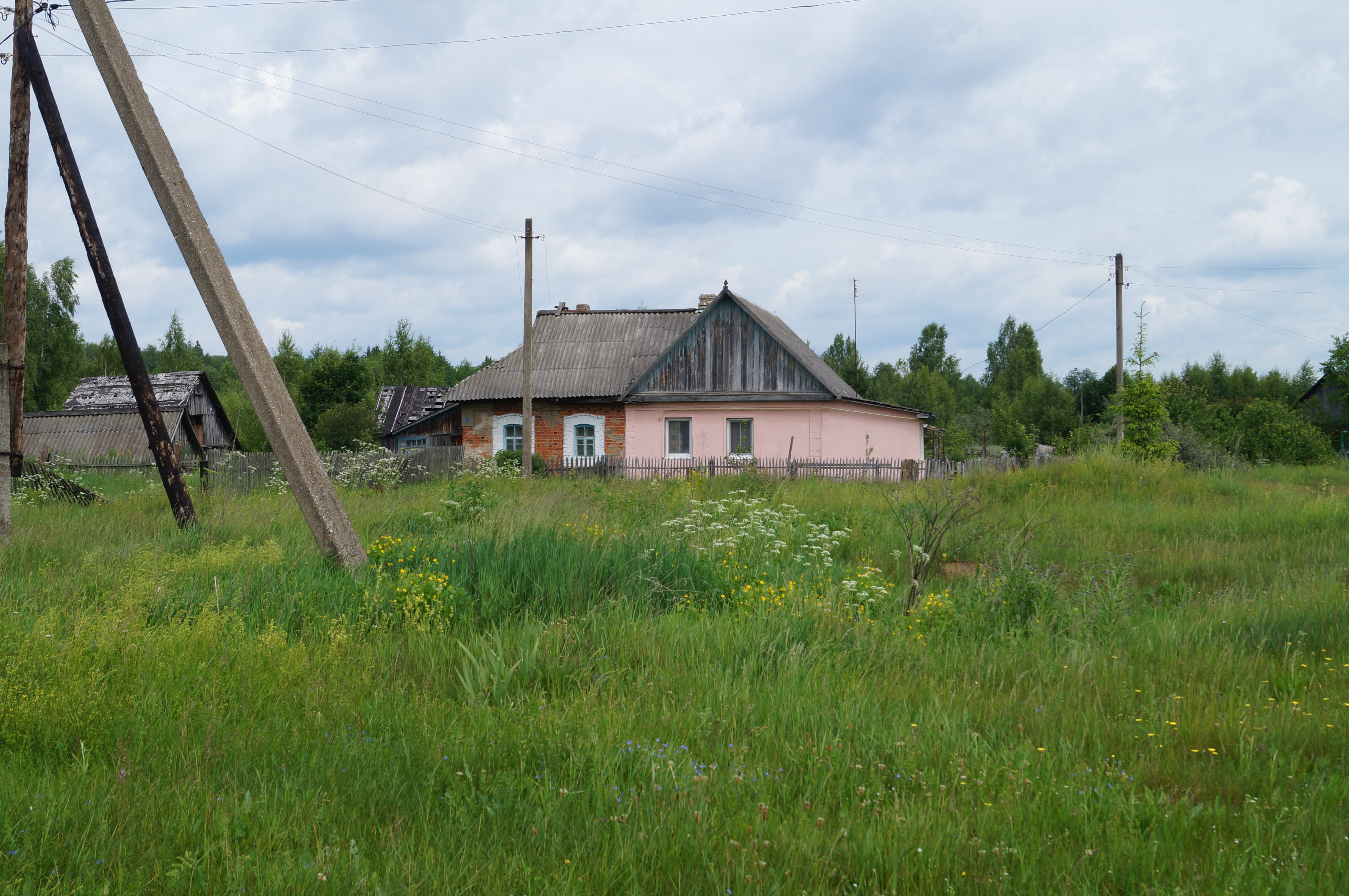 Ломенка (Думиничский район)